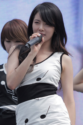 2011년 5월 24일 원자력병원 "소아암 환자들과 함께 하는 생명, 사랑, 희망 콘서트"에서 공연중의 현아.